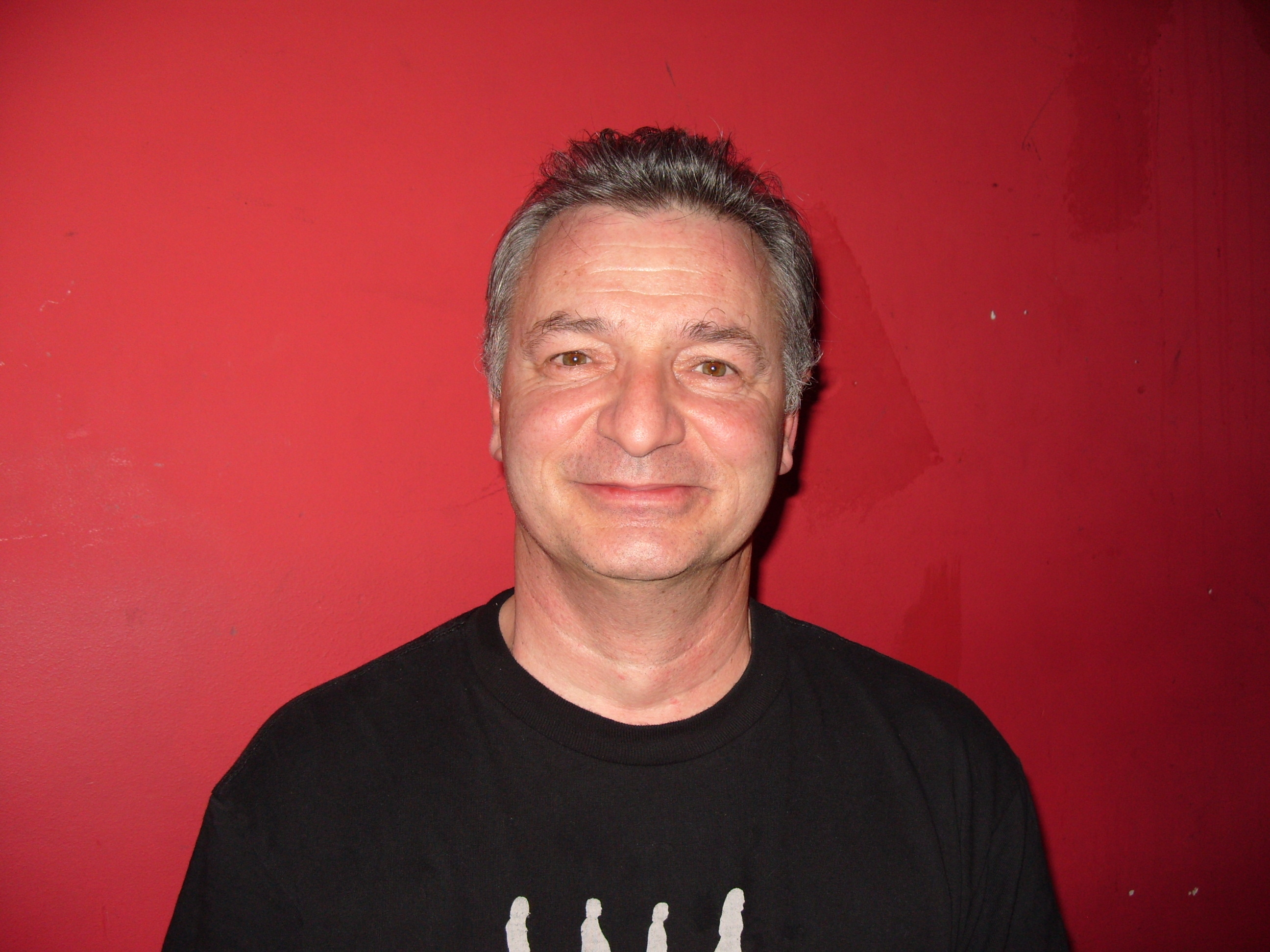 Schauspieler und Synchronsprecher Michael Pan nach einer Live Veranstaltung in Berlin am 15. Dezember 2007